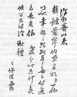 고려후기의 문신, 시인 염제신의 친필 서한문